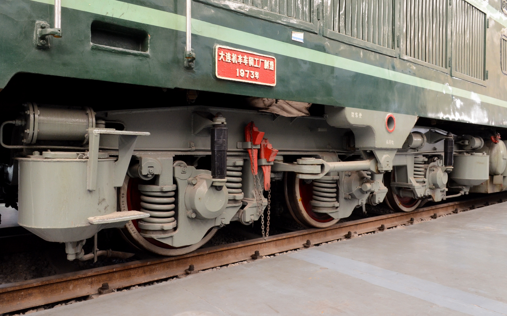 东风4型0001号车的转向架与车身上的厂商铭牌